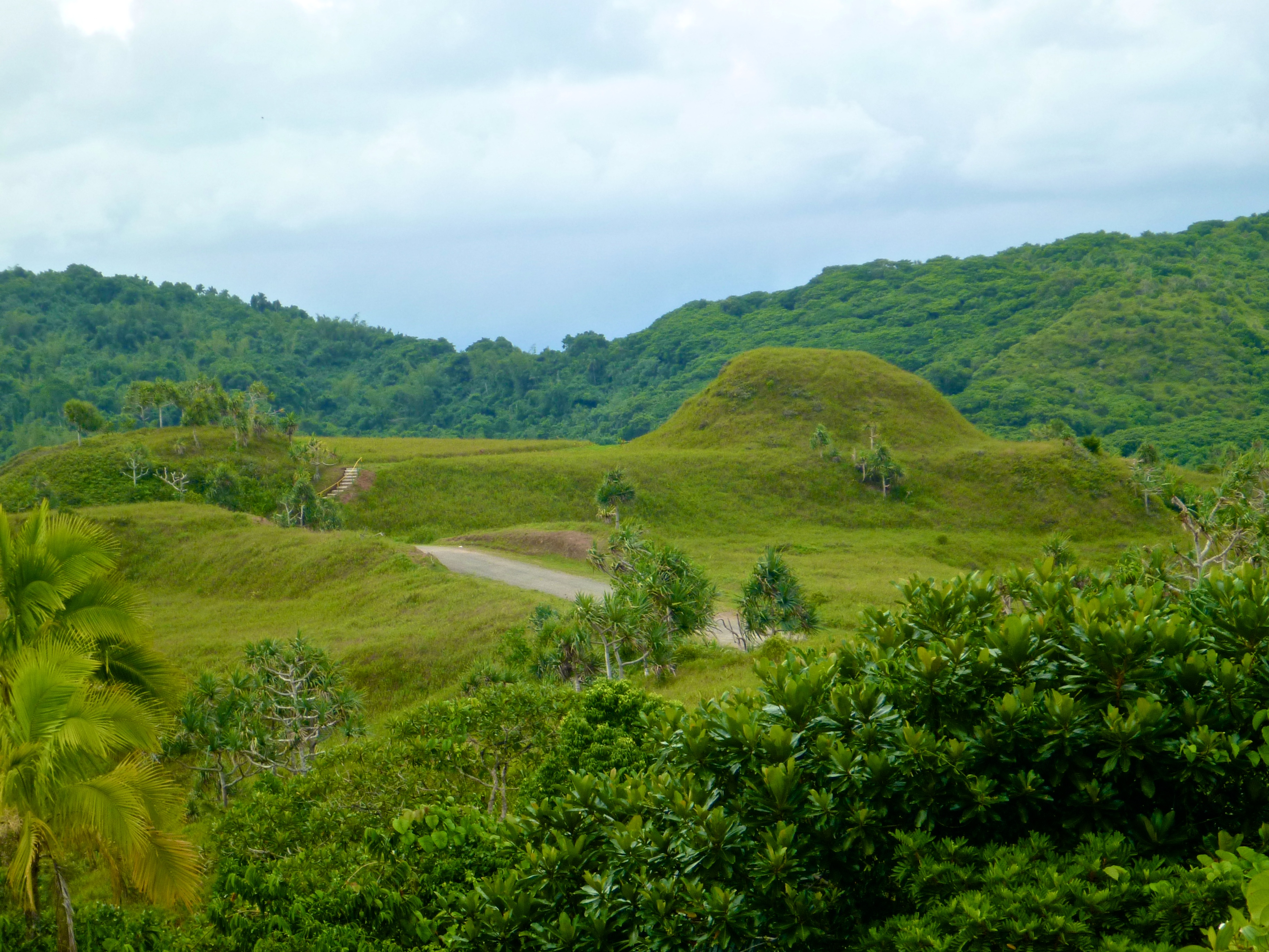 Palauan Ked (Terrace)